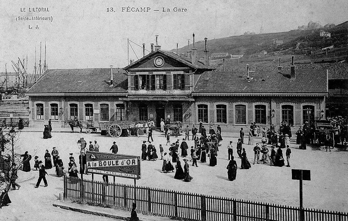 La gare de Fécamp à la fin du XIXème siècle